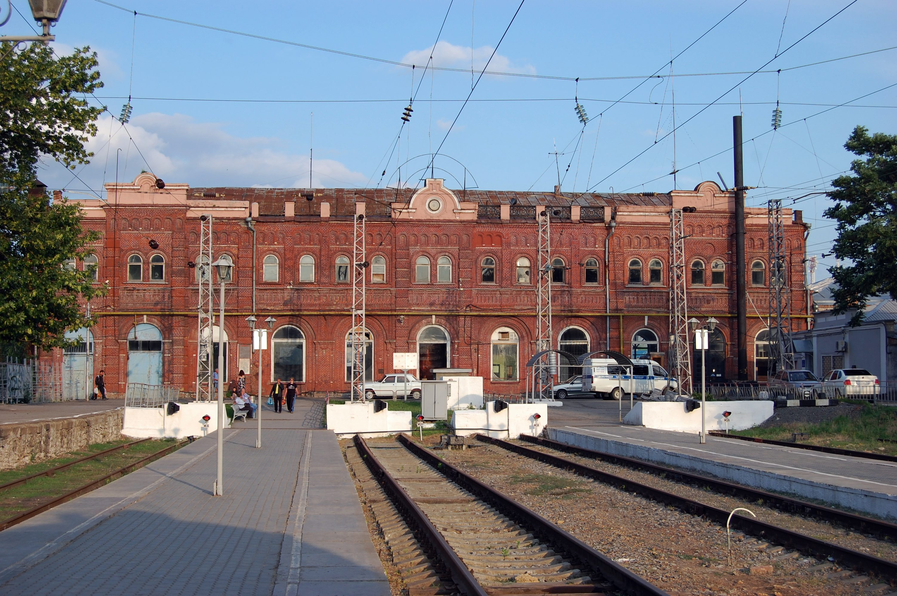 Таганрог, Старый железнодорожный вокзал